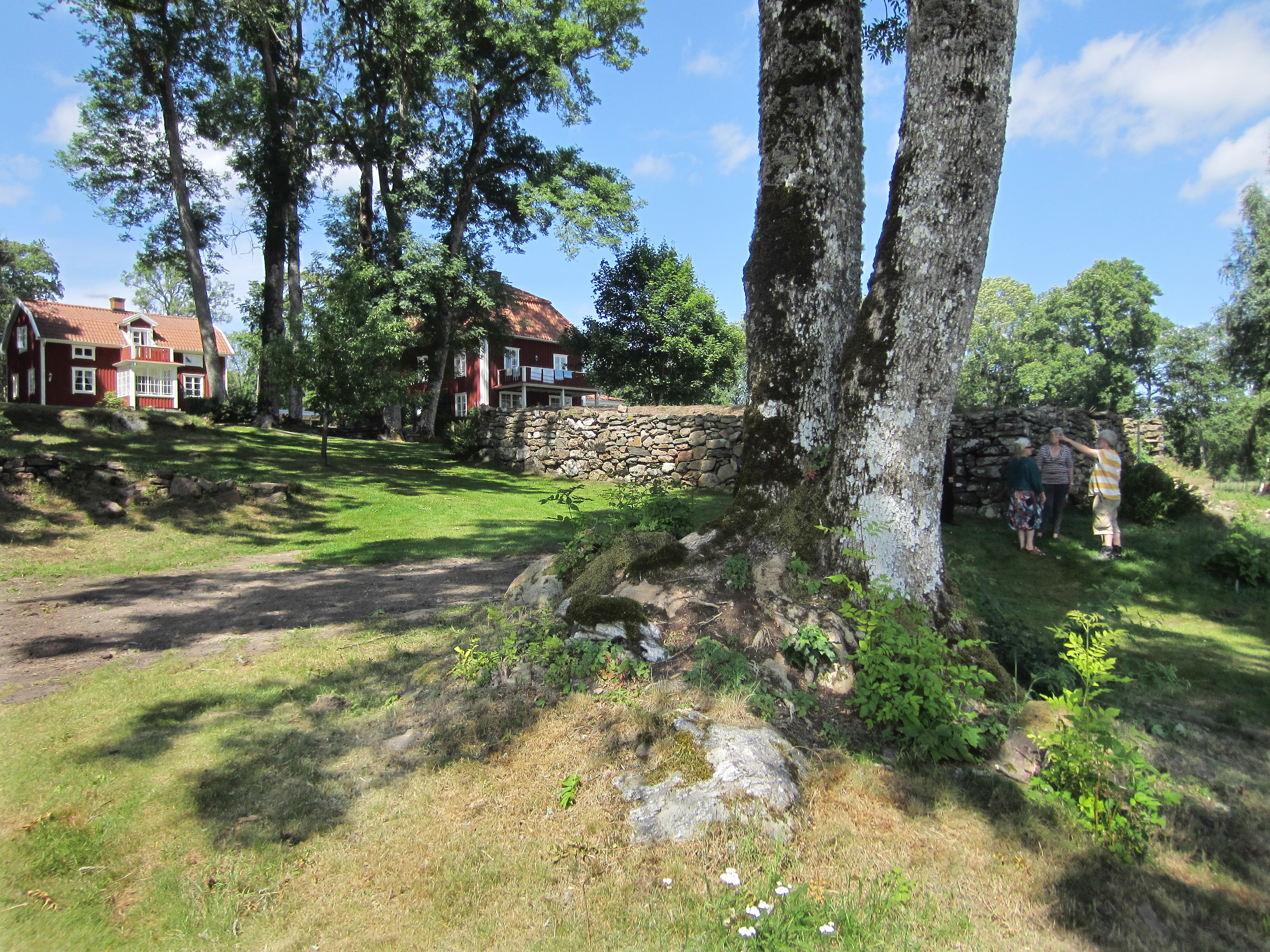 Toftanäs säteri, Bolmsö socken, Sverige.